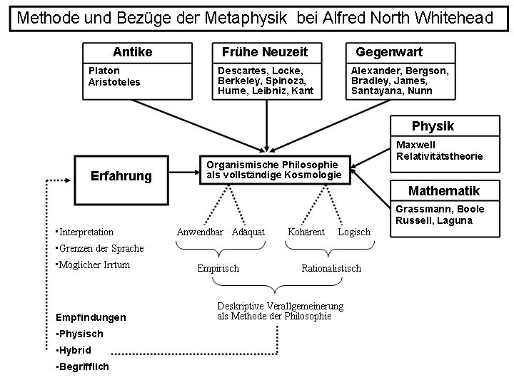 Übersicht zur Methode und zu den philosophiegeschichtlichen Bezügen von Alfred North Whitehead in Prozess und Realität